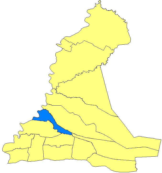 Mapa de Pilar, Paraguay.